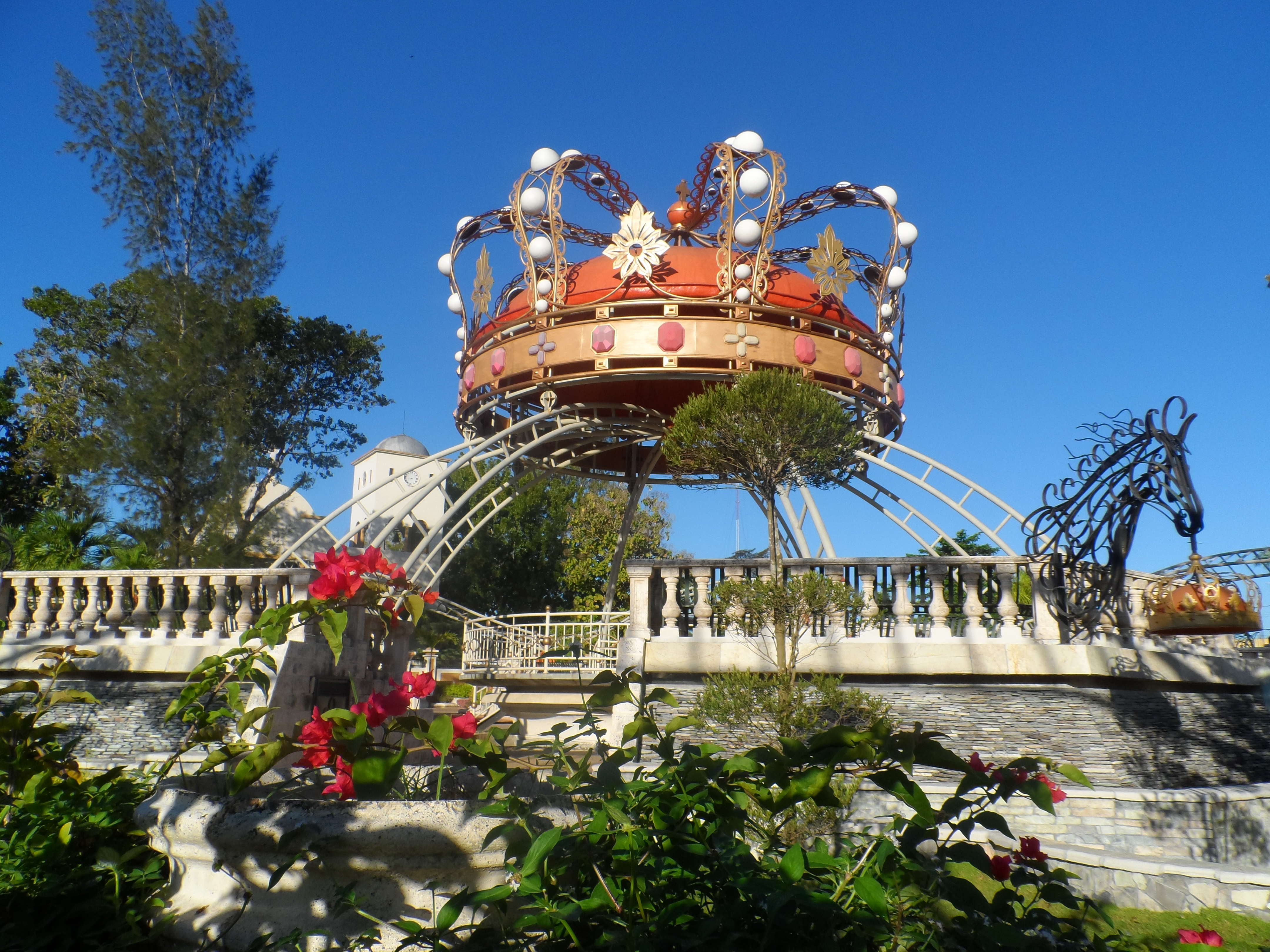 Parque Municipal Mercedes de la Rocha